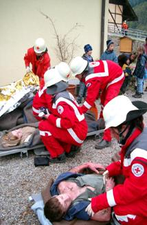 Stegen 2003, Herbstübung